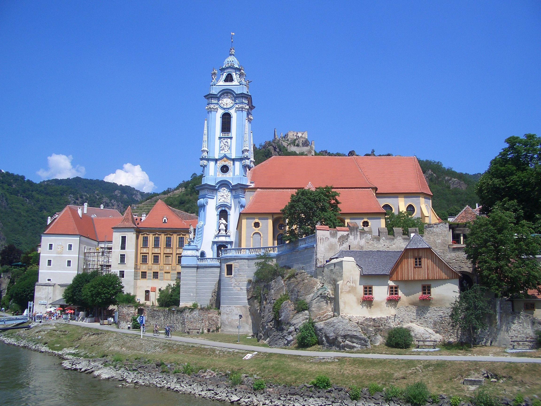 Das Chorherrenstift Dürnstein in der Wachau, von der Donau aus gesehen. Im Hintergrund ist die Ruine Dürnstein zu erkennen.